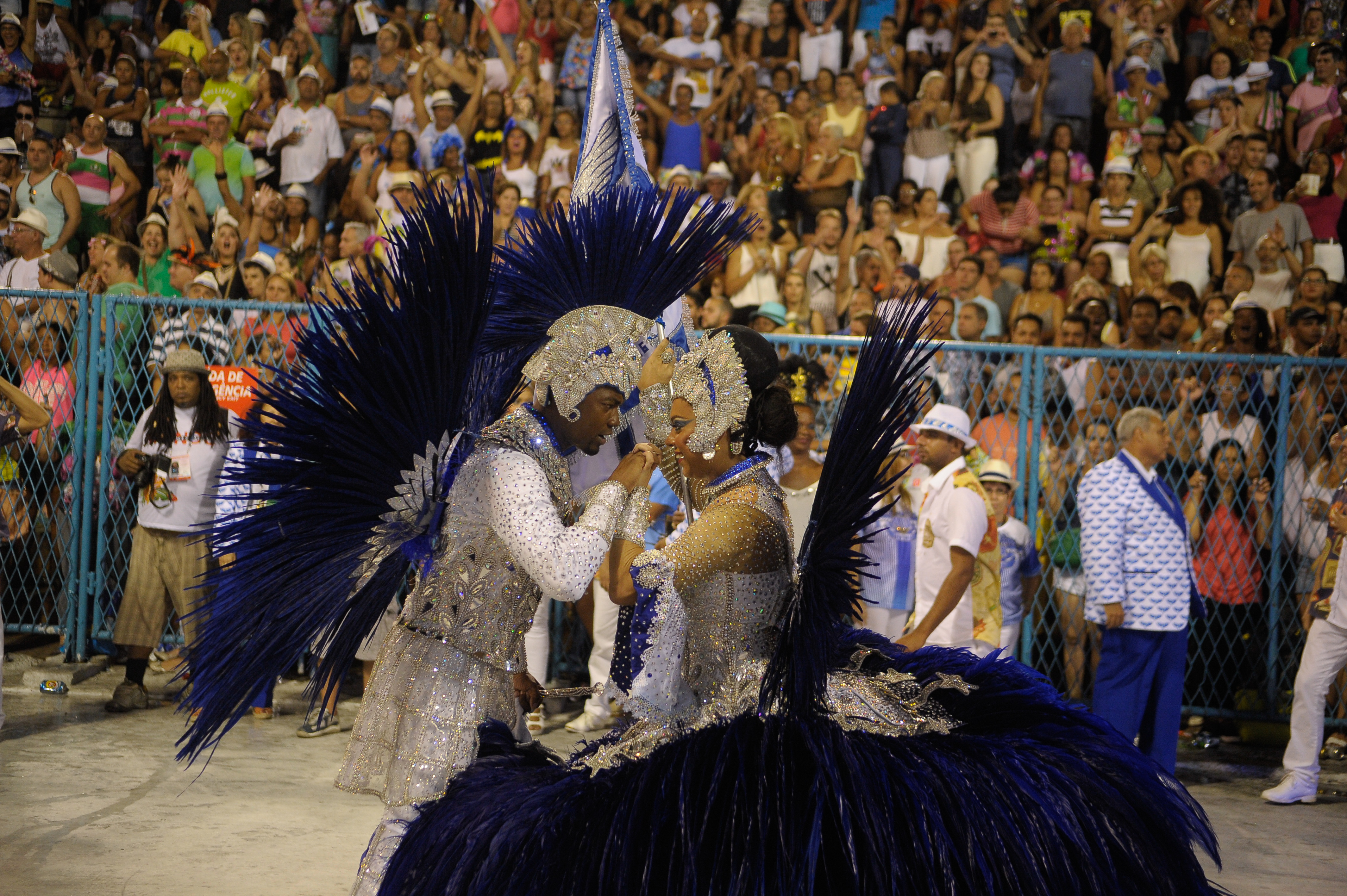 Rio de Janeiro - Portela é a quarta escola a se apresentar na Marquês de Sapucaí, no desfile das campeãs, com o enredo No Voo da Águia uma Viagem Sem Fim (Tomaz Silva/Agência Brasil)